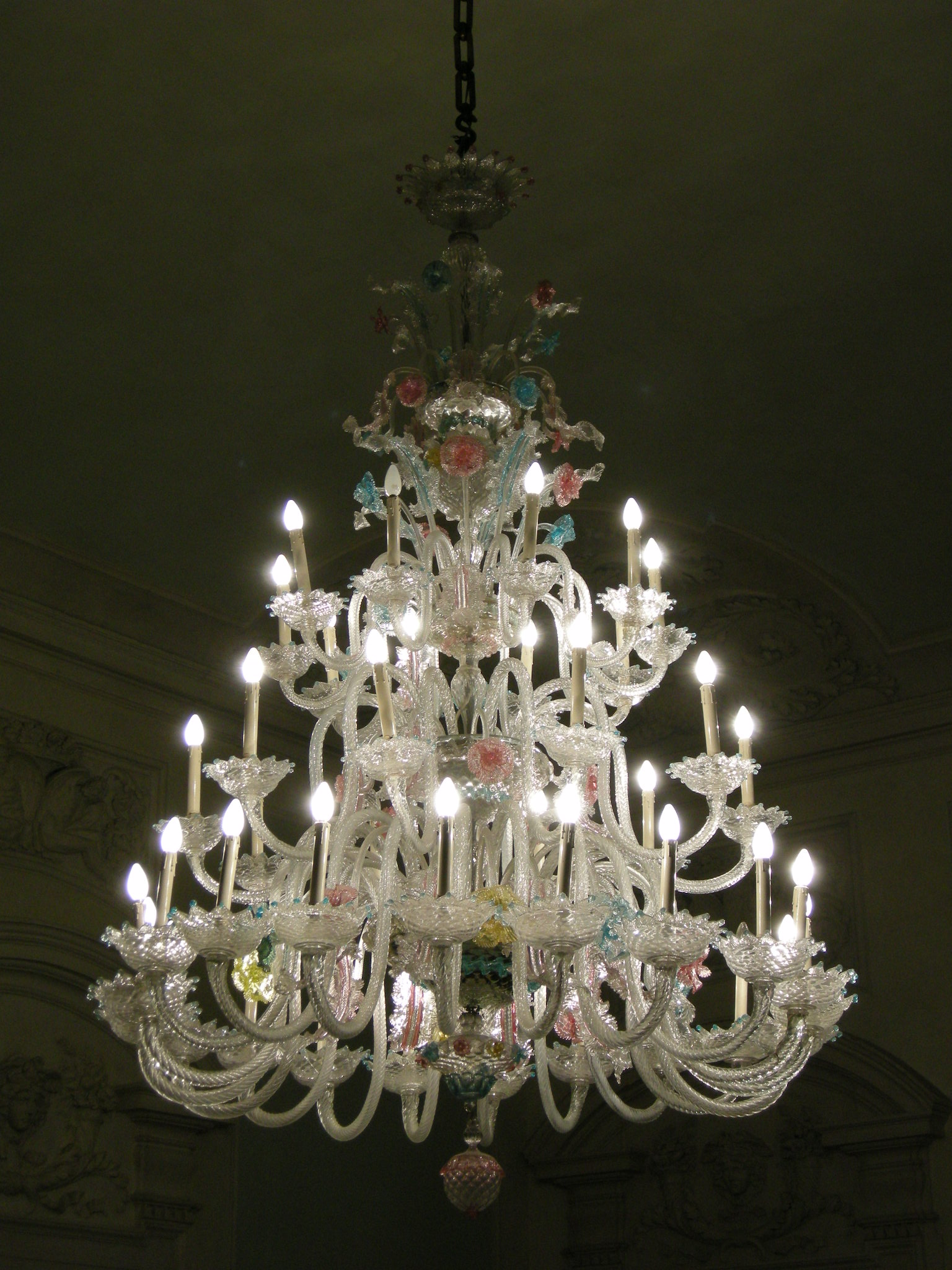 Palazzo Compagni a Firenze, salone, lampadario di Murano.